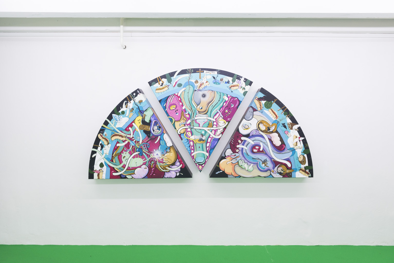 Erik Šille, Anatómia bezradnosti, 2015